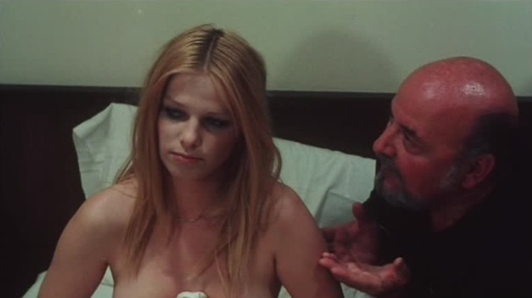 Screenshot del film L'ingenua, 1975, regia di Gianfranco Baldanello